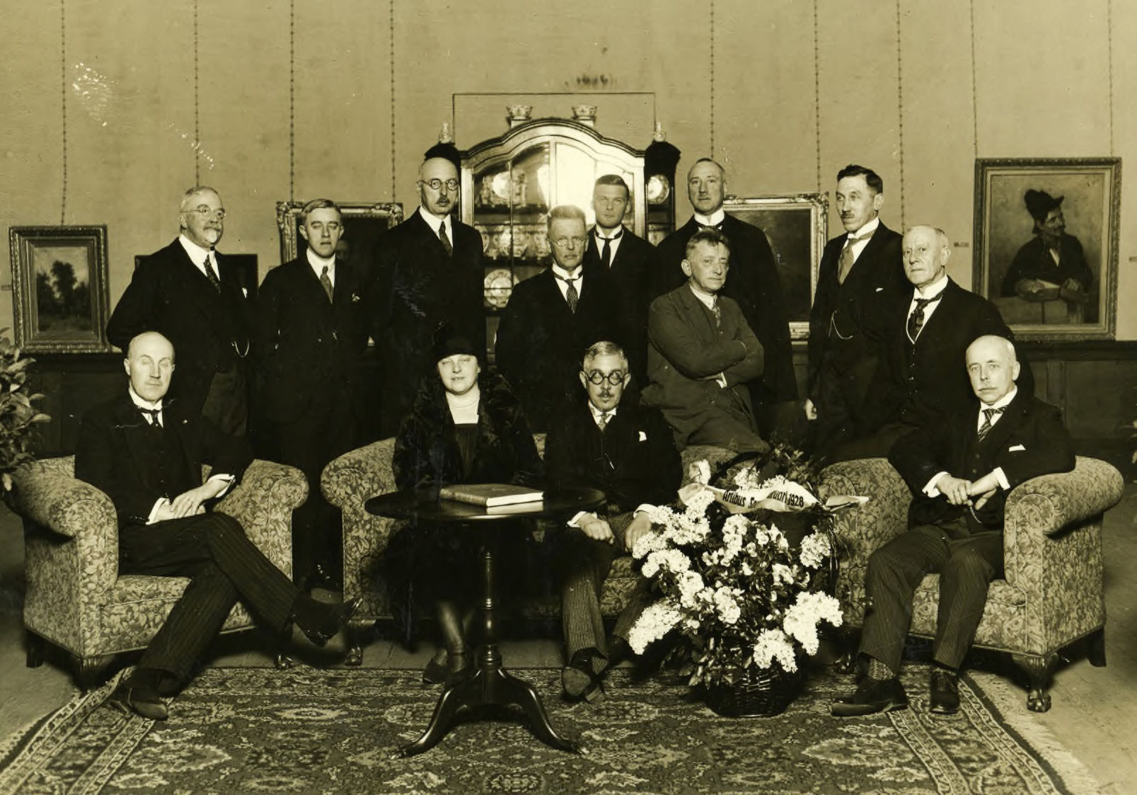 Officiële opening van de jubileumtentoonstelling van Artibus Sacrum. Op de foto staan, volgens de Arnhemsche Courant (18-02-1928): "Zittend, v.l.n.r.: Burgemeester Mr. de Monchy, Mevr. de Monchy, Mr. J.W. Frowein, vooorziter, J.C. Koningsberger, secretaris. Staand (zelfde volgorde): Mr. W. van Hulst, J. Wolthers, Leo Schilt, A.A. Jesse, J.W. Franken. S. Gouda Quint, penningmeester, Xeno Munninghoff (zittend). F.W. van der Haagen en B.W. Kraake." Op de foto staan, volgens het Gelders Archief: "Zittend vlnr: de Monchy, mw. de Monchy, Frohwein, Xeno Munninghoff, v.d. Haagen en Koningsbergen. Staand vlnr: Kapitein Kraake, Wolters, Schilt, Franken, Gouda, Quint," Op de foto staan, volgens het Nationaal Archief: "vlnr: burgemeester S.J.R. de Monchy en echtgenote; Mr. Frowein, J.C. Koningsberge. Staand: M.r van Hulst, J. Wolthers, Leo Schilt, A. Jesse, J. Franke, S. Gouda Quint, Xeno Bunningkolf (half zittend), F. v.d. Hooge, B.W. Kraak."